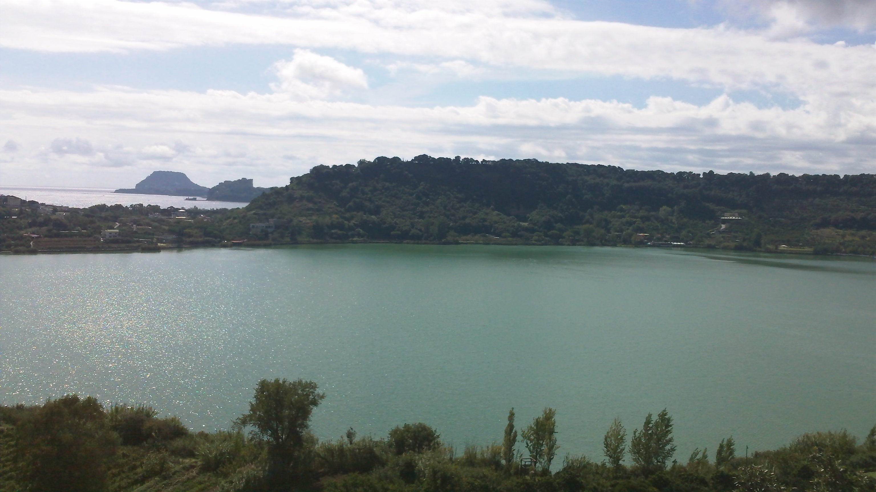 Le lac Averne était considéré par les Romains comme l'entrée des Enfers à cause de son activité volcanique. Il était dédié à Pluton.